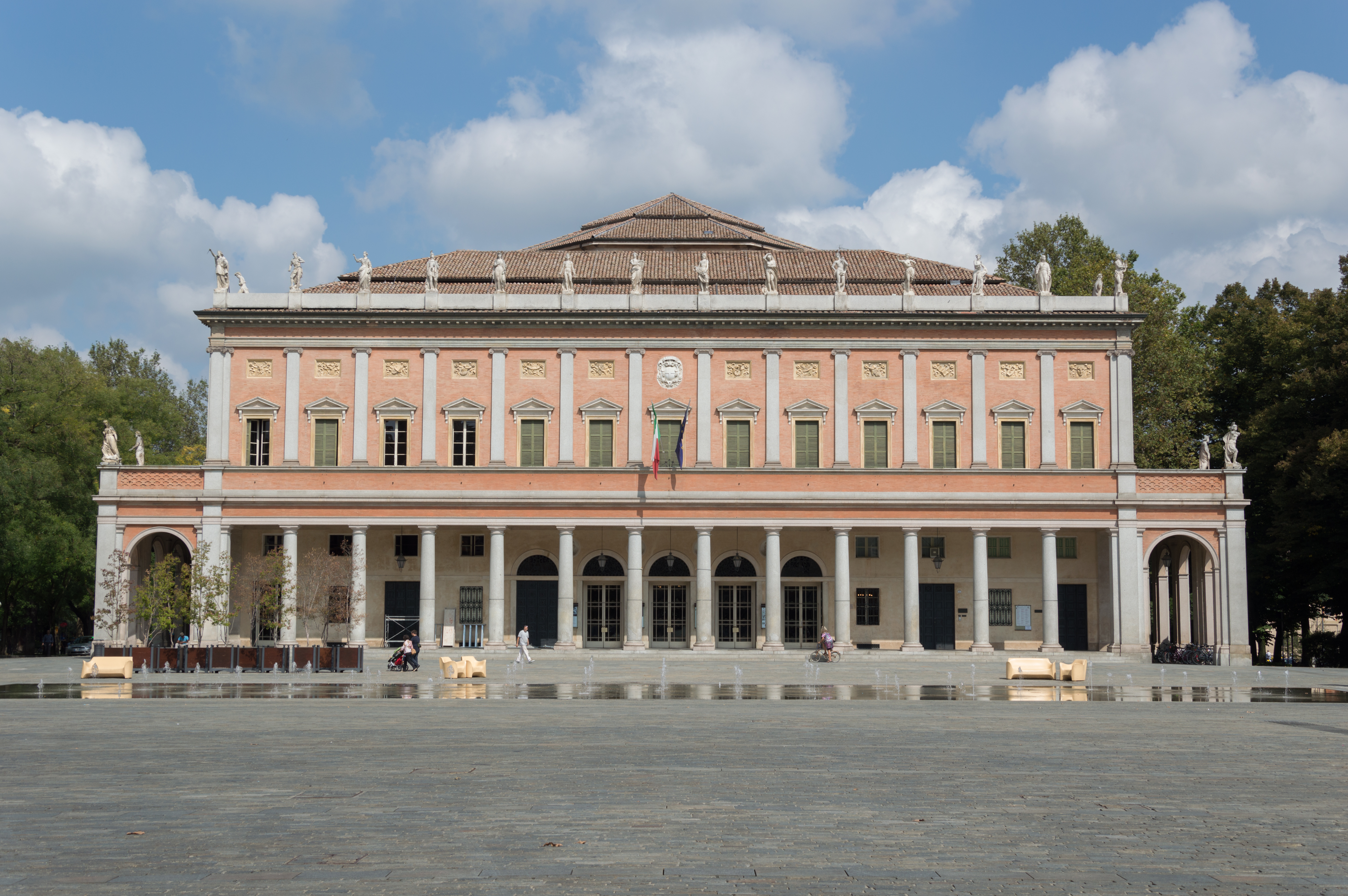 Teatro Municipale Romolo Valli This is a photo of a monument which is part of cultural heritage of Italy.